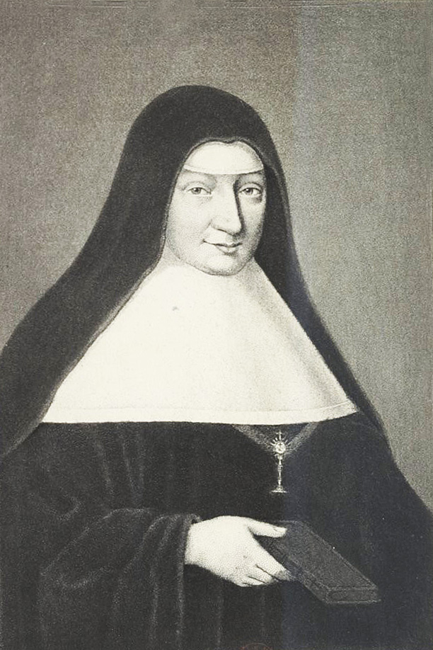 Catherine de Bar, in Ildephonse Hervin et Marie-Joseph Dourlens, Vie abrégée de la Très révérende mère Mechtilde du Saint Sacrement, fondatrice de l'Institut des Bénédictines de l'Adoration perpétuelle du Très-Saint-Sacrement, Bray et Retaux, Paris, 1883